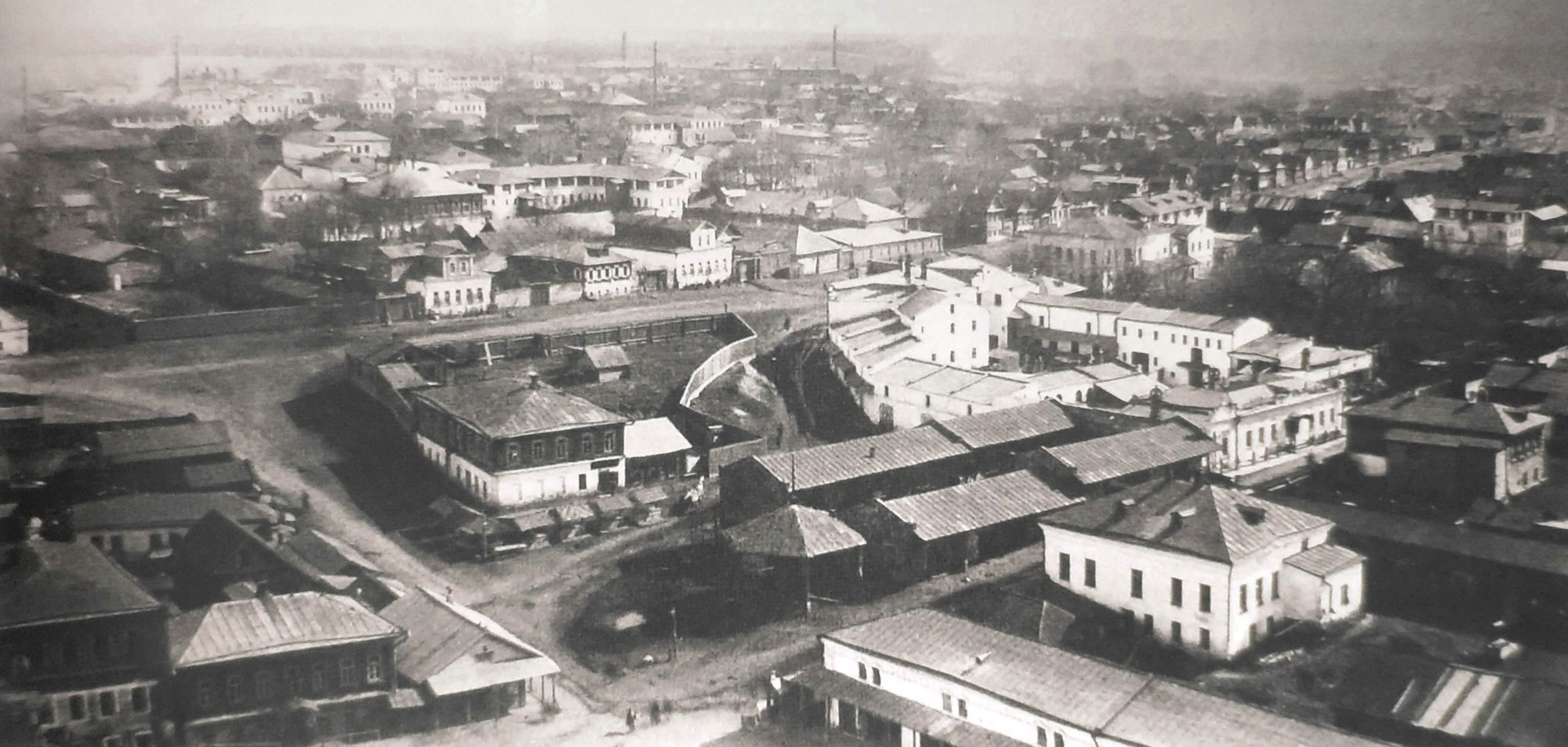 Улица Кокуй И Нижние Торговые Ряды. Иваново-Вознесенск. На переднем плане Нижний Базар (ул.Красногвардейская), на дальнем - улица Кокуй (ул.10 Августа)